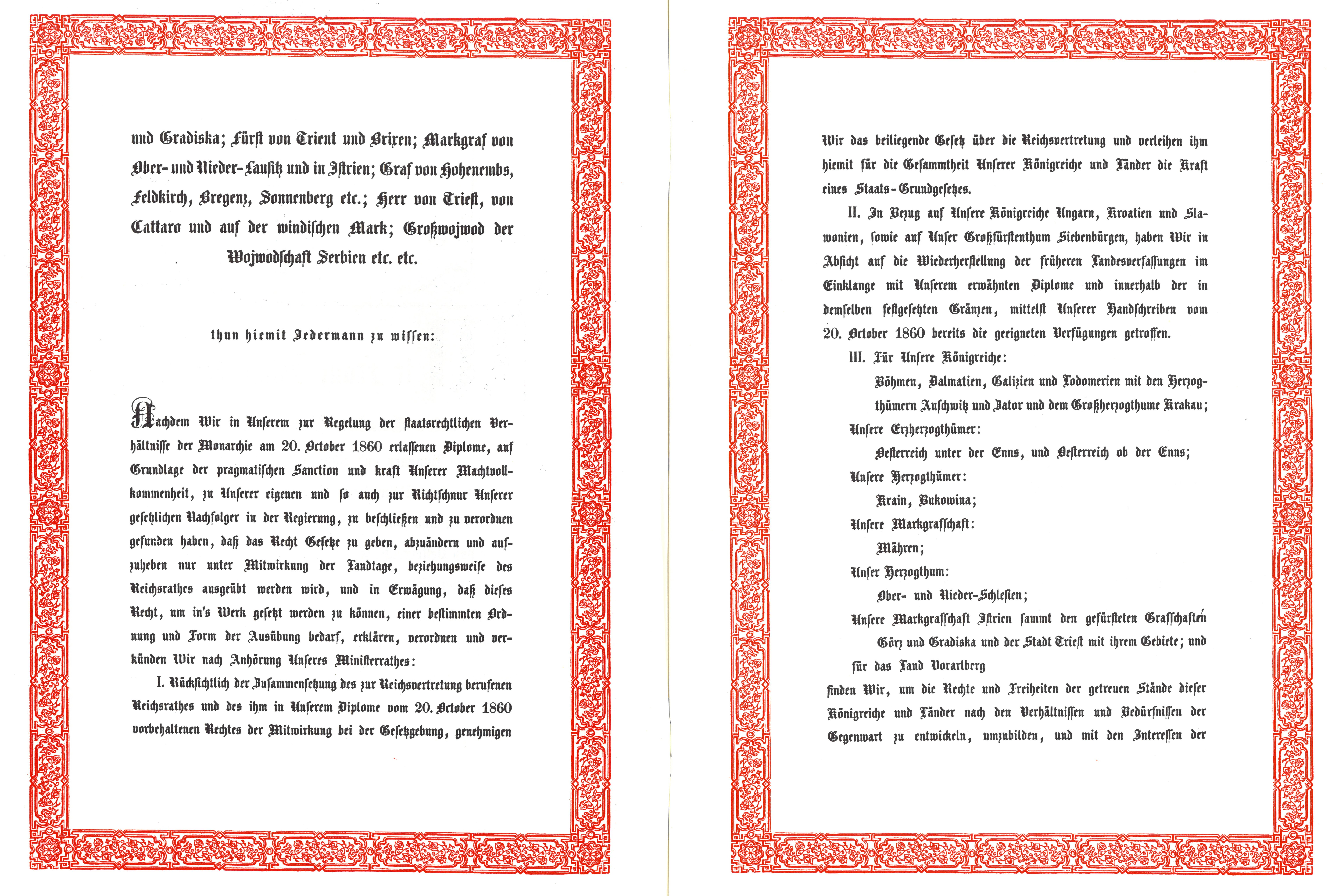 Auszug aus dem “Februarpatent”, vom 26. 02. 1861 durch Kaiser Franz Joseph.